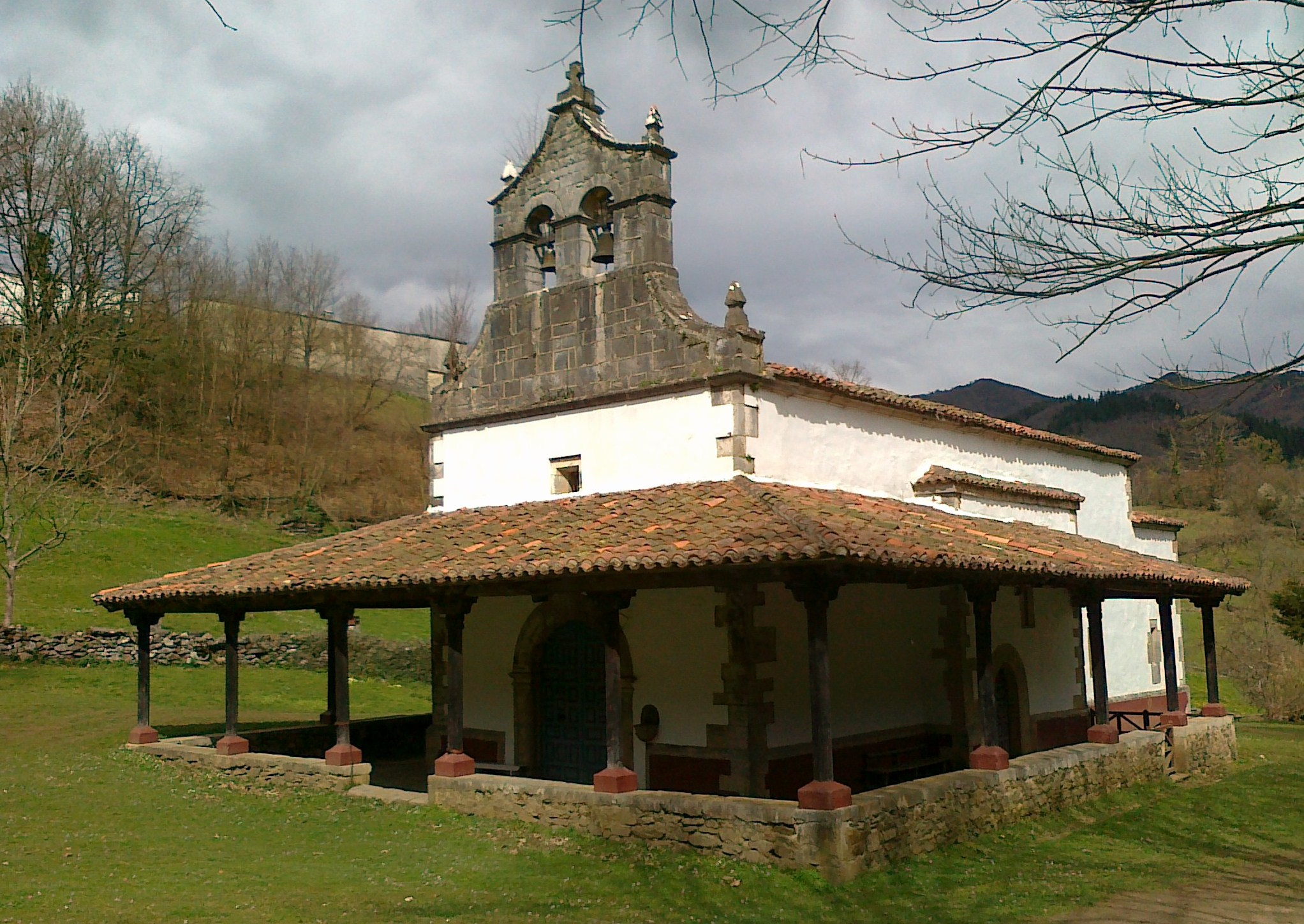 Santuario de Miravalles-Flanco sur este